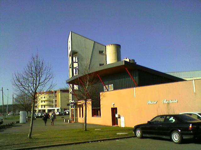 le Resto universitaire Bartholdi